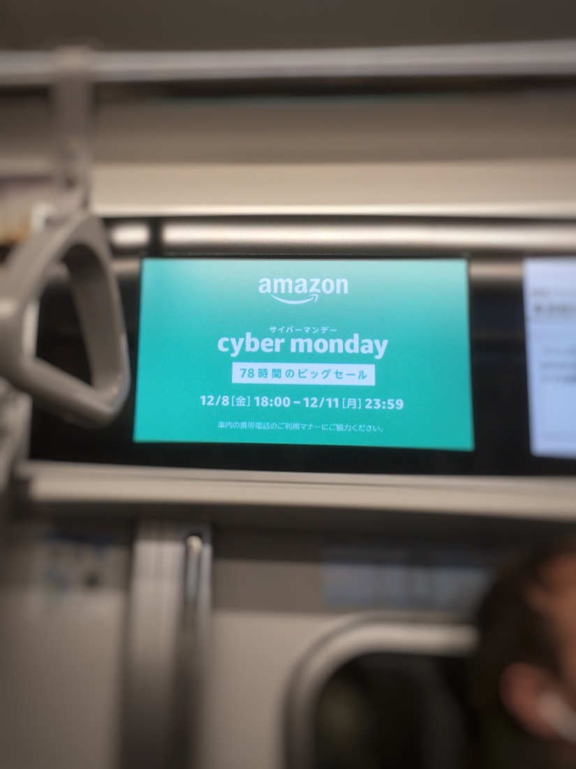 サイバーマンデーセール広告 地下鉄